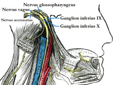 Ausschnittsvergößerung von Image:Gray793.png mit deutscher Beschriftung